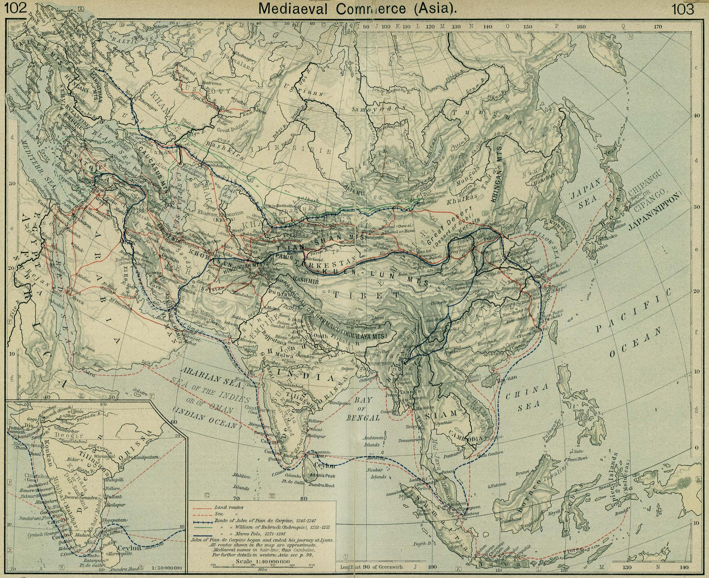 Historische kaart handel in Azië. Publiek domein vanwege ouderdom. From The Historical Atlas by William R. Shepherd (1871 – 1934), 1926. Van